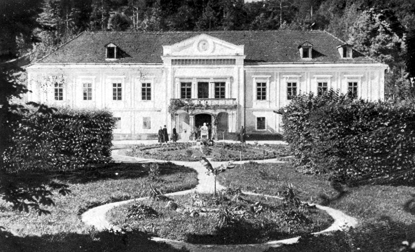 Predvojna razglednica dvorca Teriška vas